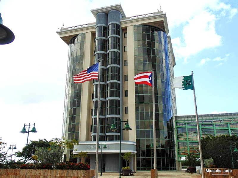 alcaldia de guaynabo